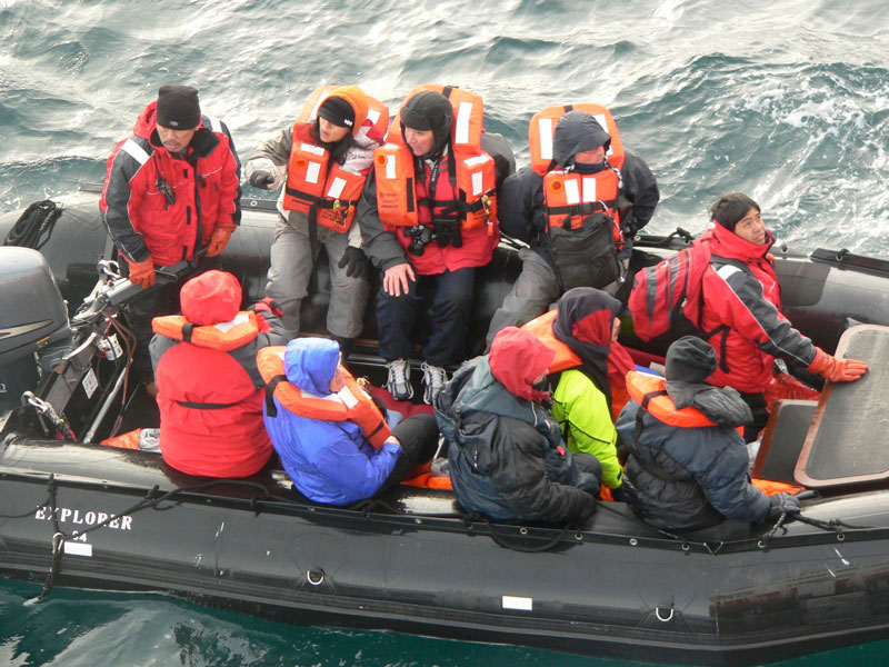 Untergang der MS Explorer und Rettungsaktion der MS Nordnorge am 23.11.2007 im Bransfield Strait